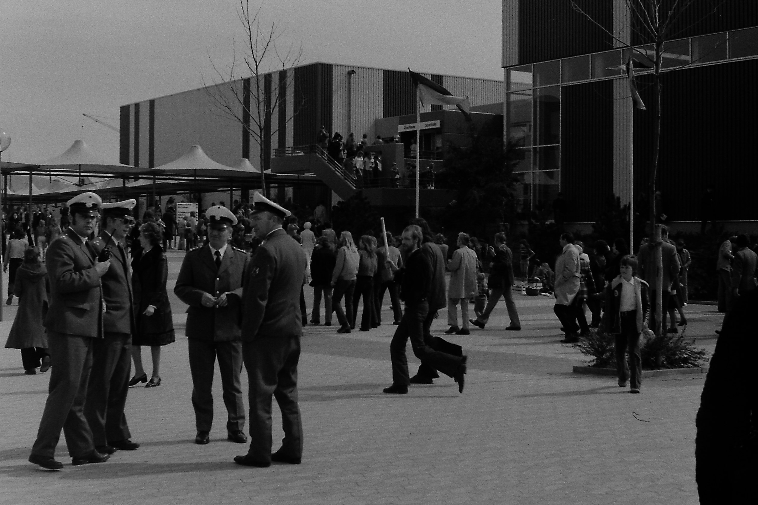 Deutschland (D) - Nordrhein-Westfalen (NW) - Kreis Lippe (LIP) - Bad Salzuflen: Einweihungsfeier des Schulzentrums Lohfeld